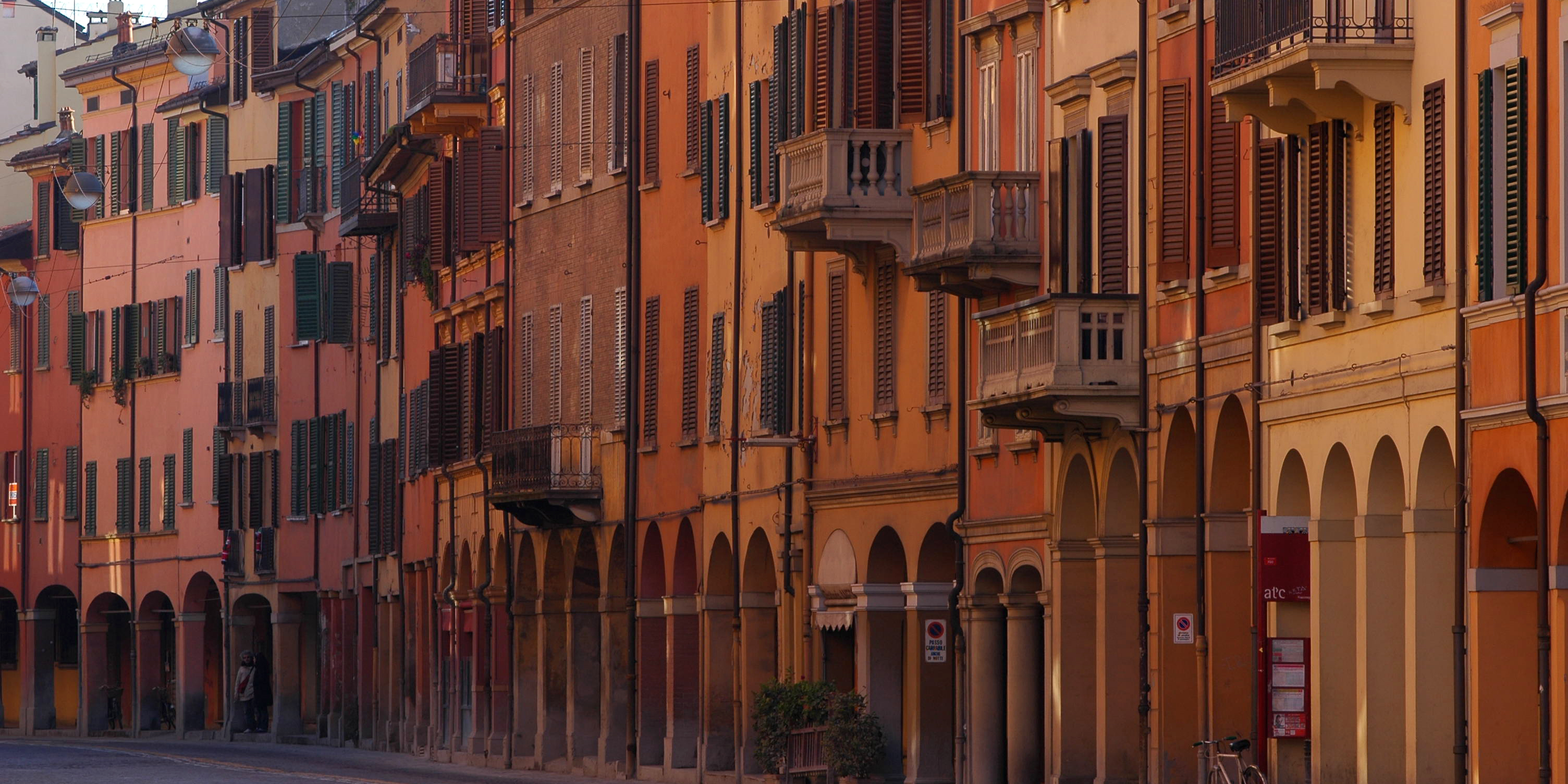 Portici (esclusi San Luca e Alemanni). Portici di Via Saragozza (appena dentro le mura, sono i portici di destra se si guarda da porta Saragozza verso il centro), Bologna, Emilia-Romagna, Italia. This is a photo of a monument which is part of cultural heritage of Italy.